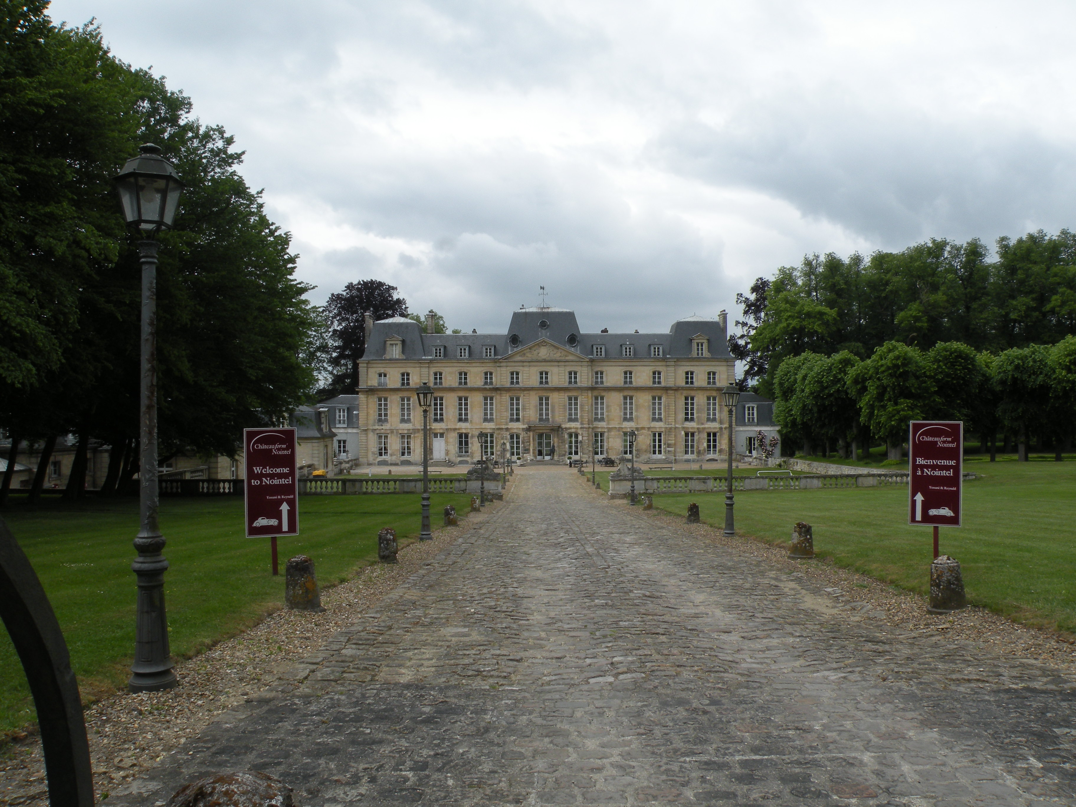 chateau de Nointel (Val-d'Oise)